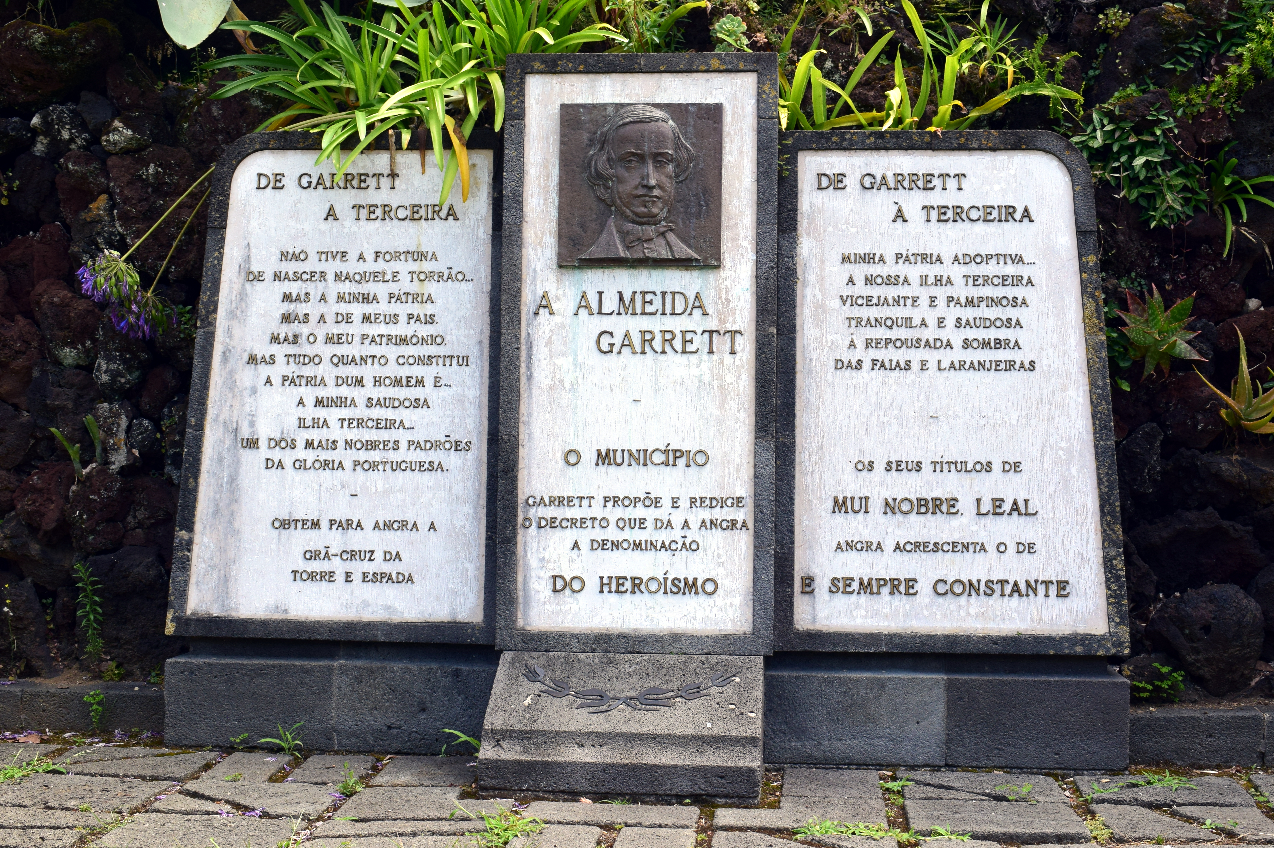 Denkmal für den Schriftsteller Almeida Garrett im Stadtpark (Jardim Duque da Terceira) von Angra do Heroísmo